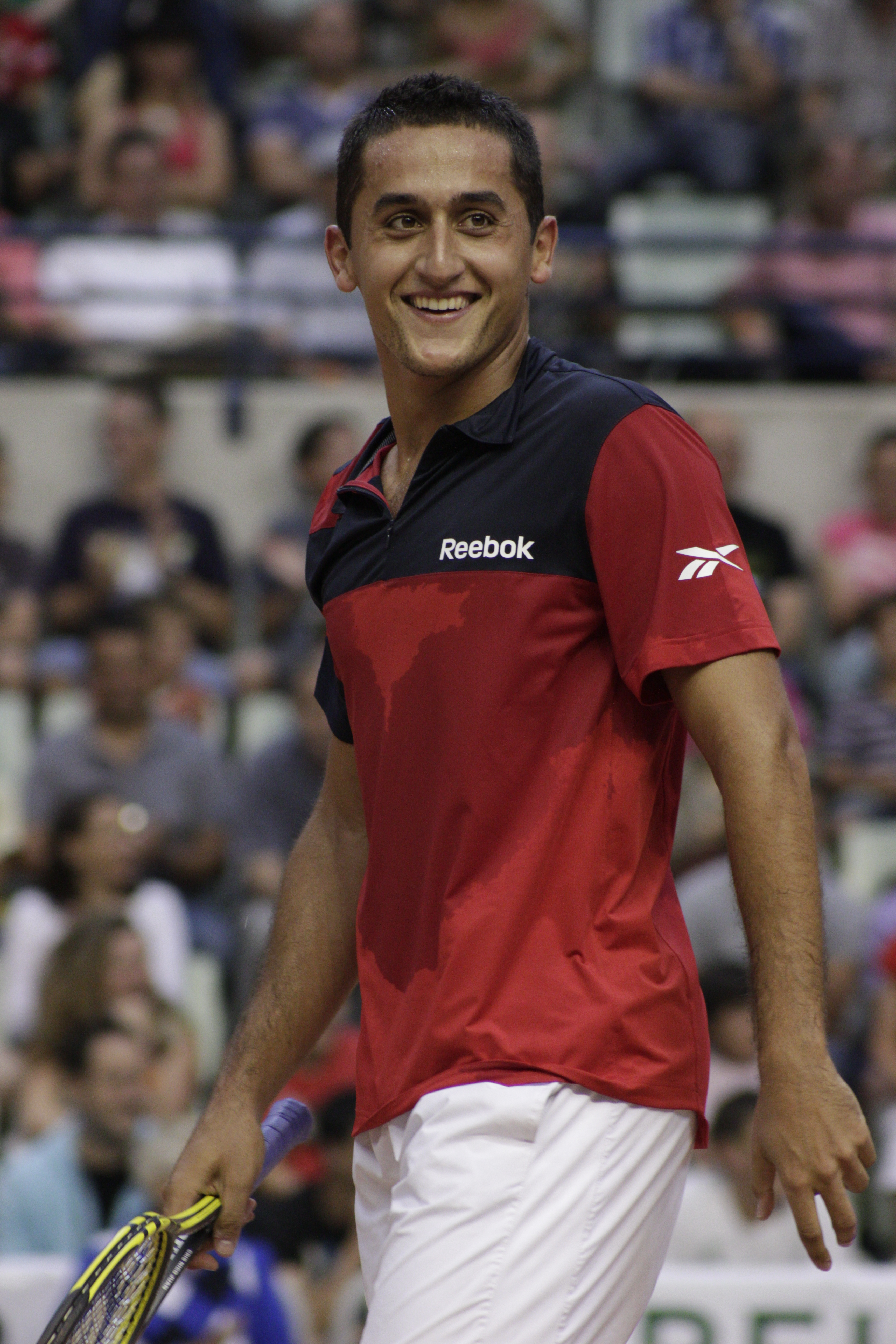 Almagro - Ferrero Partido en beneficio de los damnificados por el terremoto en Lorca